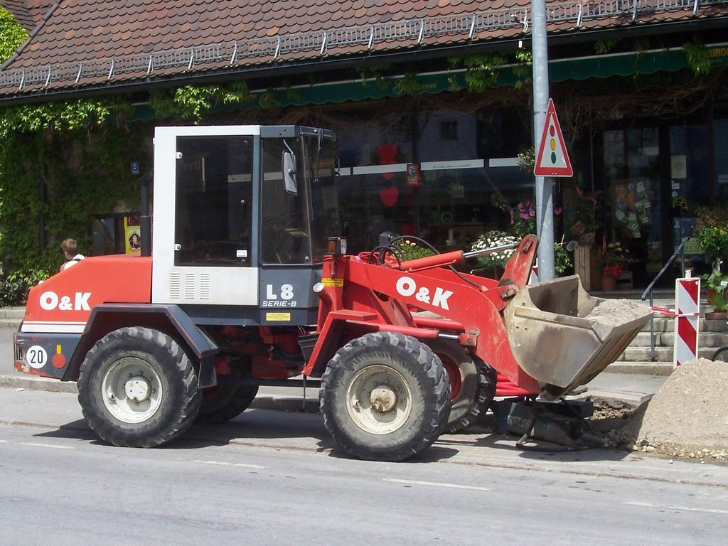 Quelle: Harald H. Linz Fotograf: Harald H. Linz Mit ausdrücklicher Genehmigung von Harald. H. Linz für Wiki eingestellt.